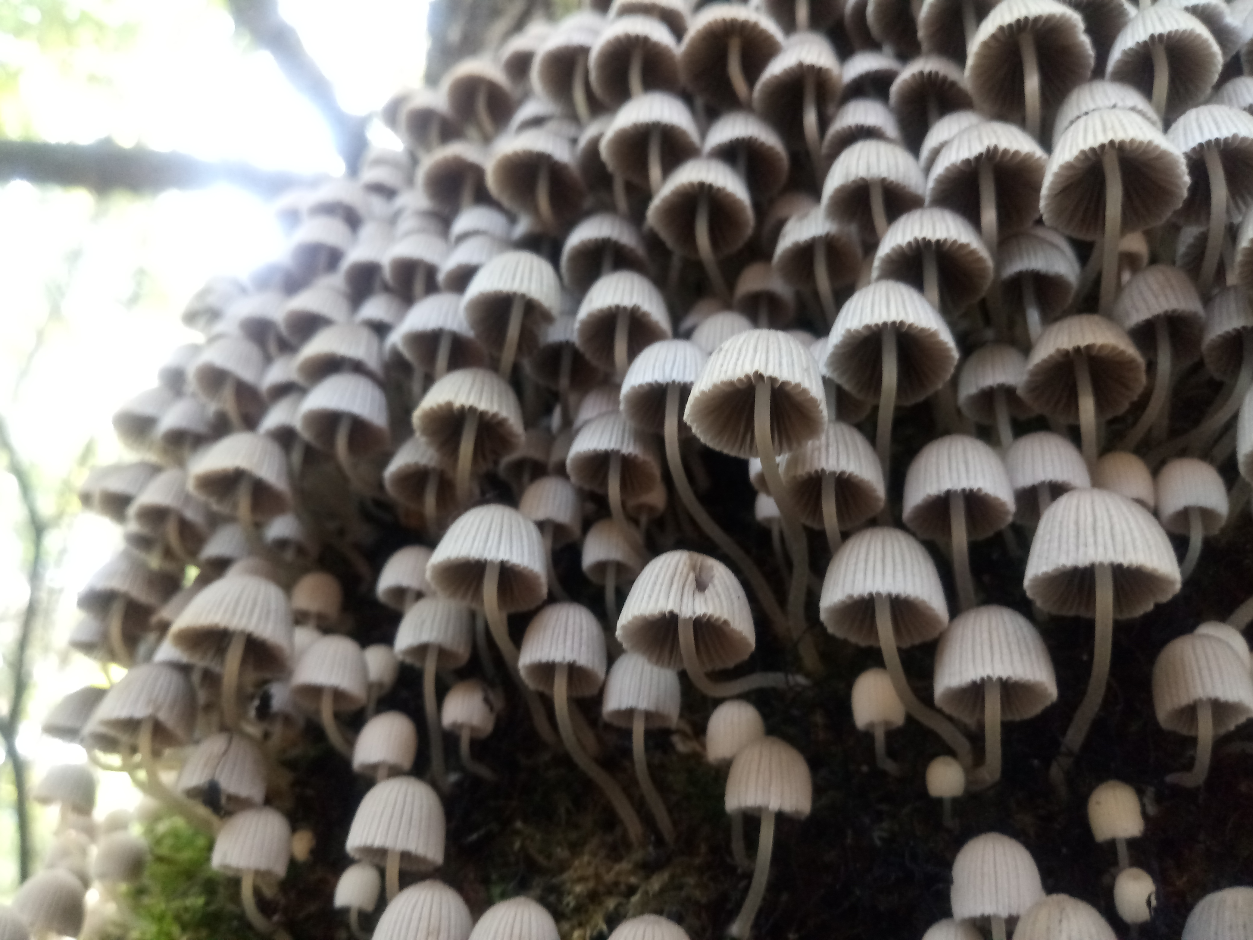 Coprinellus disseminatus